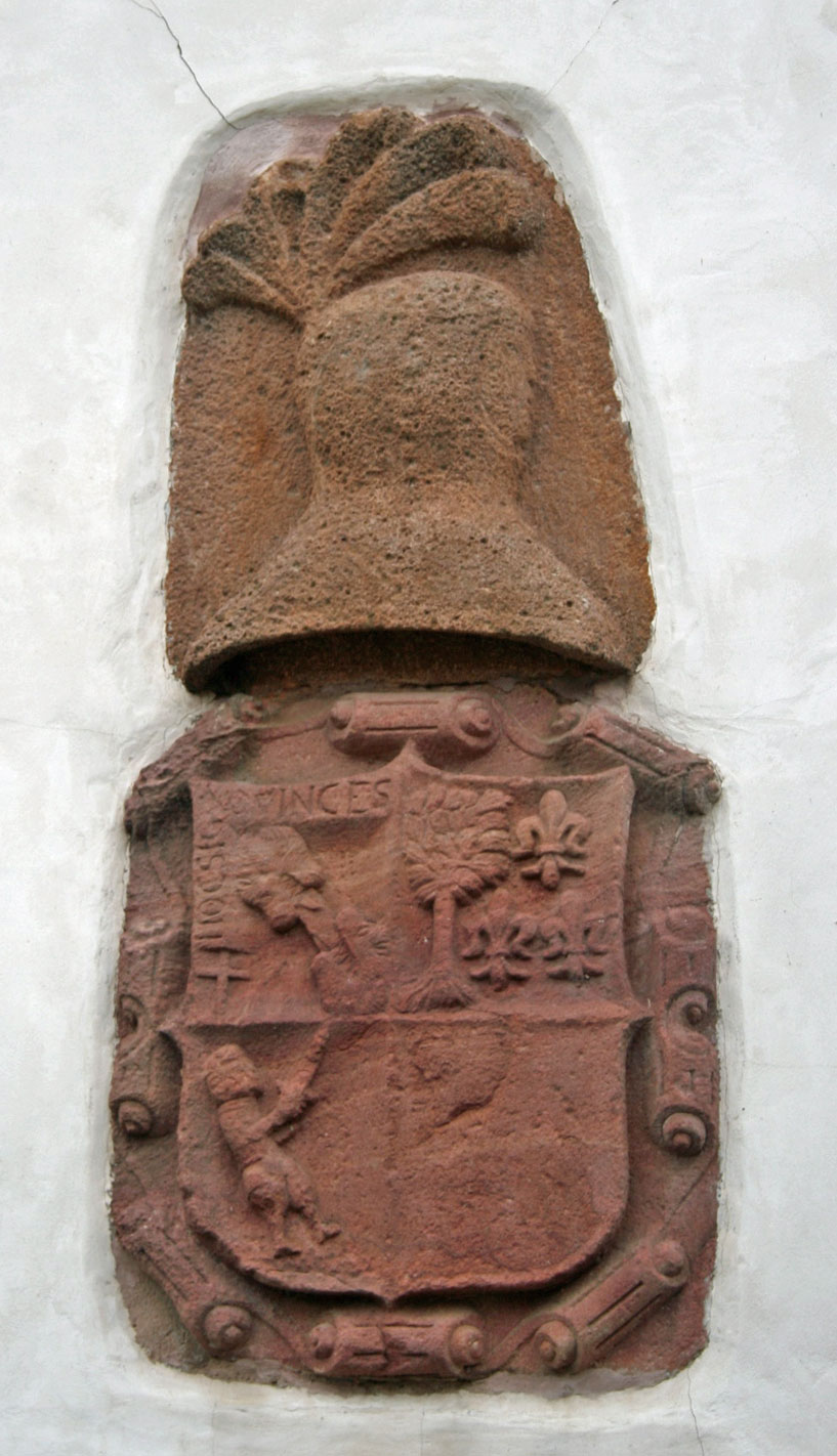 Escudo de Riego en su casa natal.